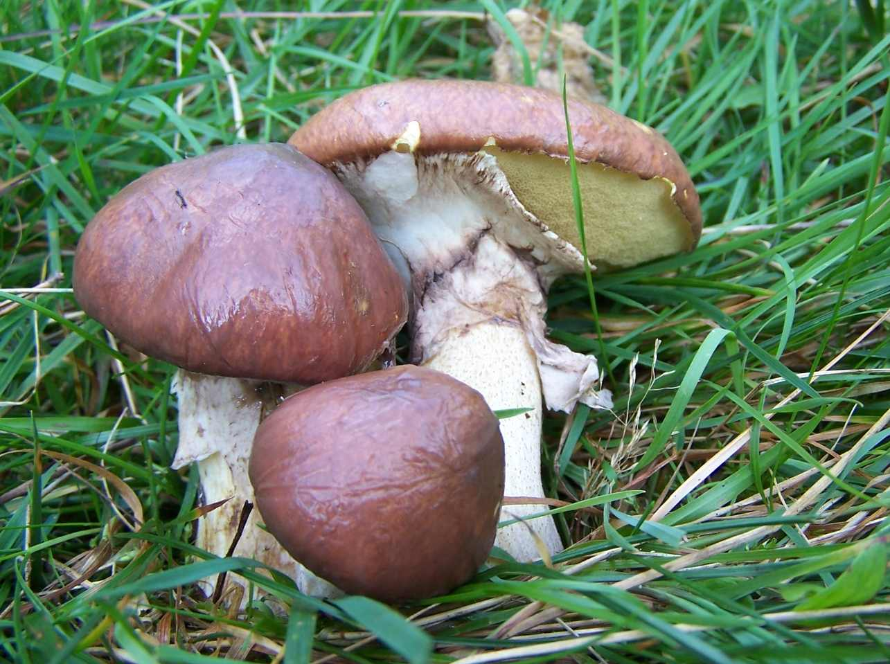 Name:Suillus luteus, Family:Boletaceae (pl. maślak zwyczajny)